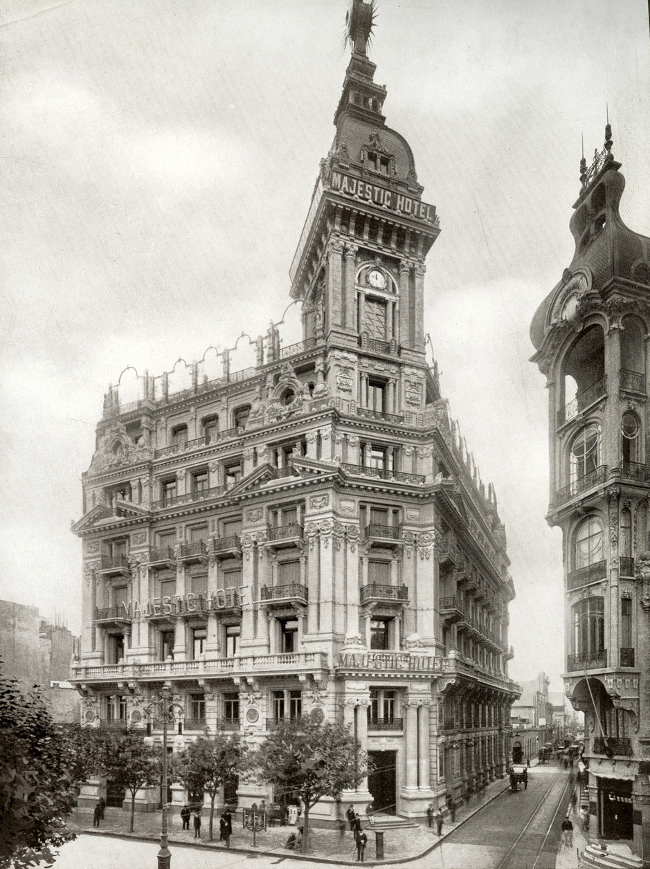 Vista del Hotel Majestic en Buenos Aires. Avenida de Mayo, esquina Santiago del Estero. Actual sede abandonada de la Administración Federal de Ingresos Públicos (AFIP).